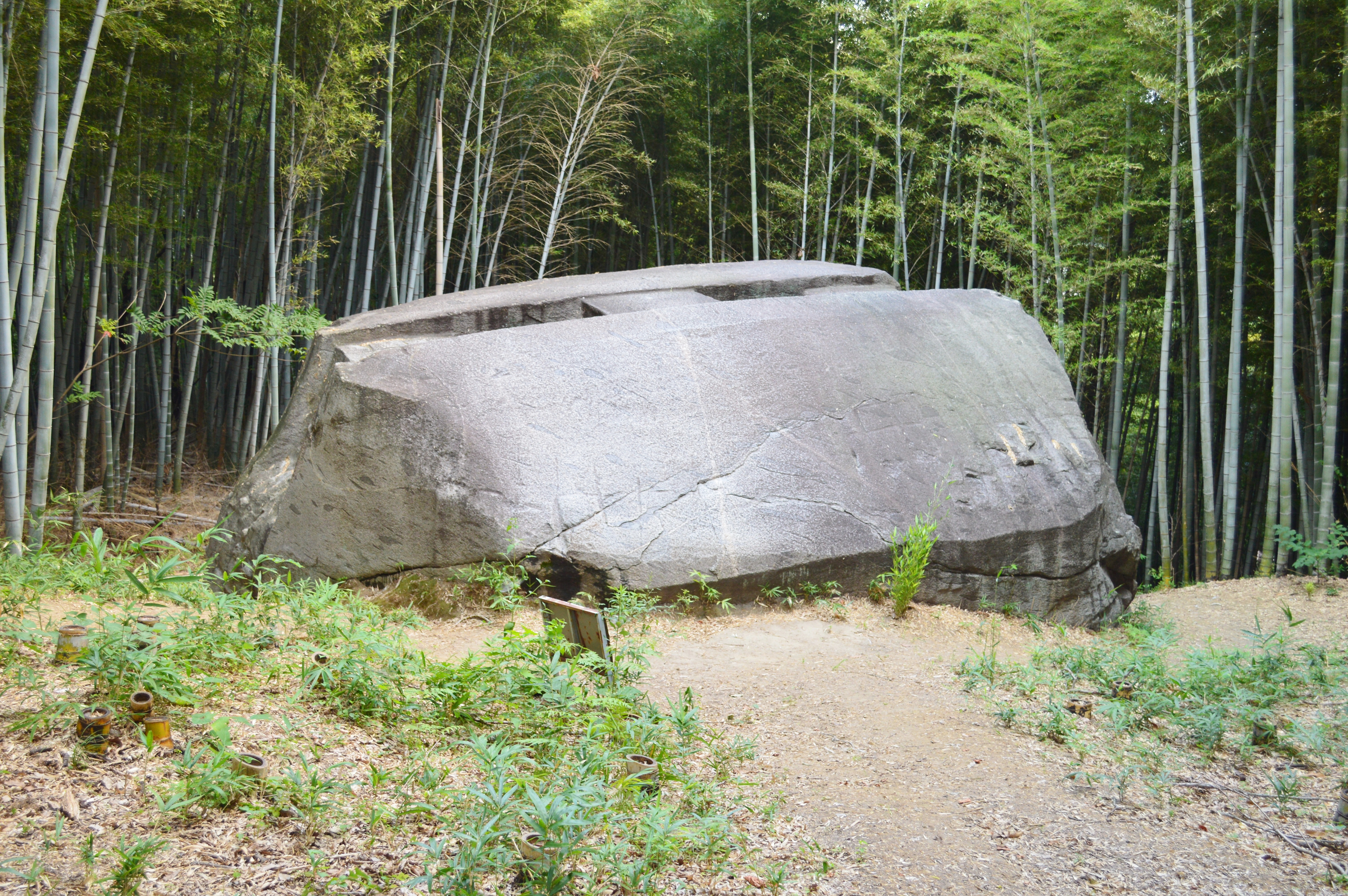 益田の岩船 南面